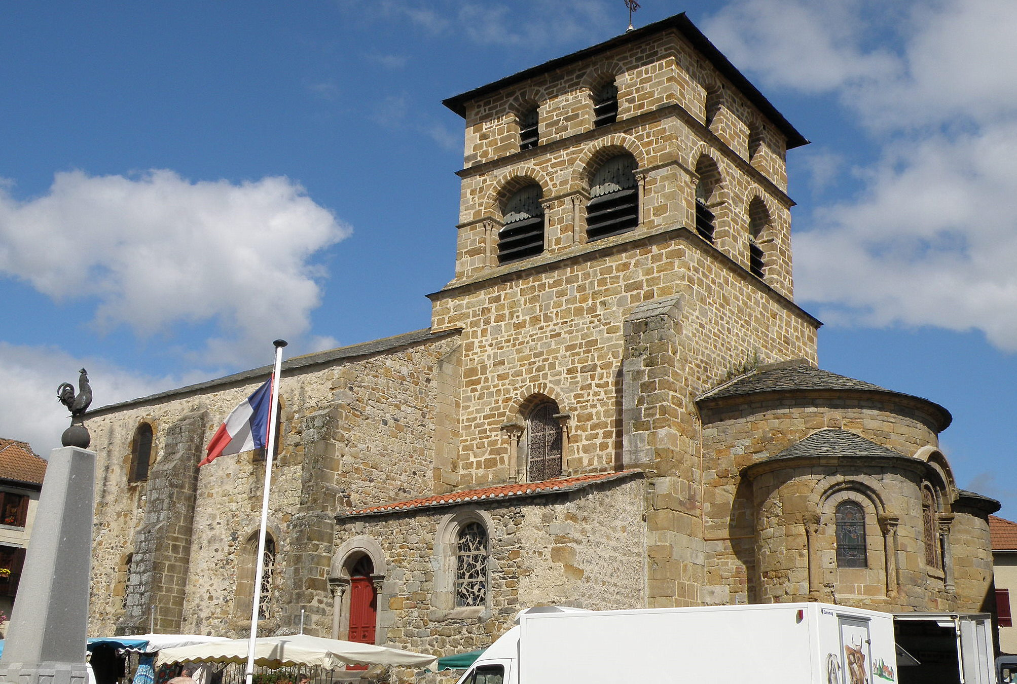 Retournac, dép. de la Haute-Loire, France (Auvergne). Église Saint-Jean-Baptiste, flanc sud, clocher et abside.